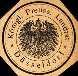 Sealing stamp Title: Königlich Preussischer Landrat - Düsseldorf Description: Briefsiegel, grau, schwarz Place: Düsseldorf size: 4 cm